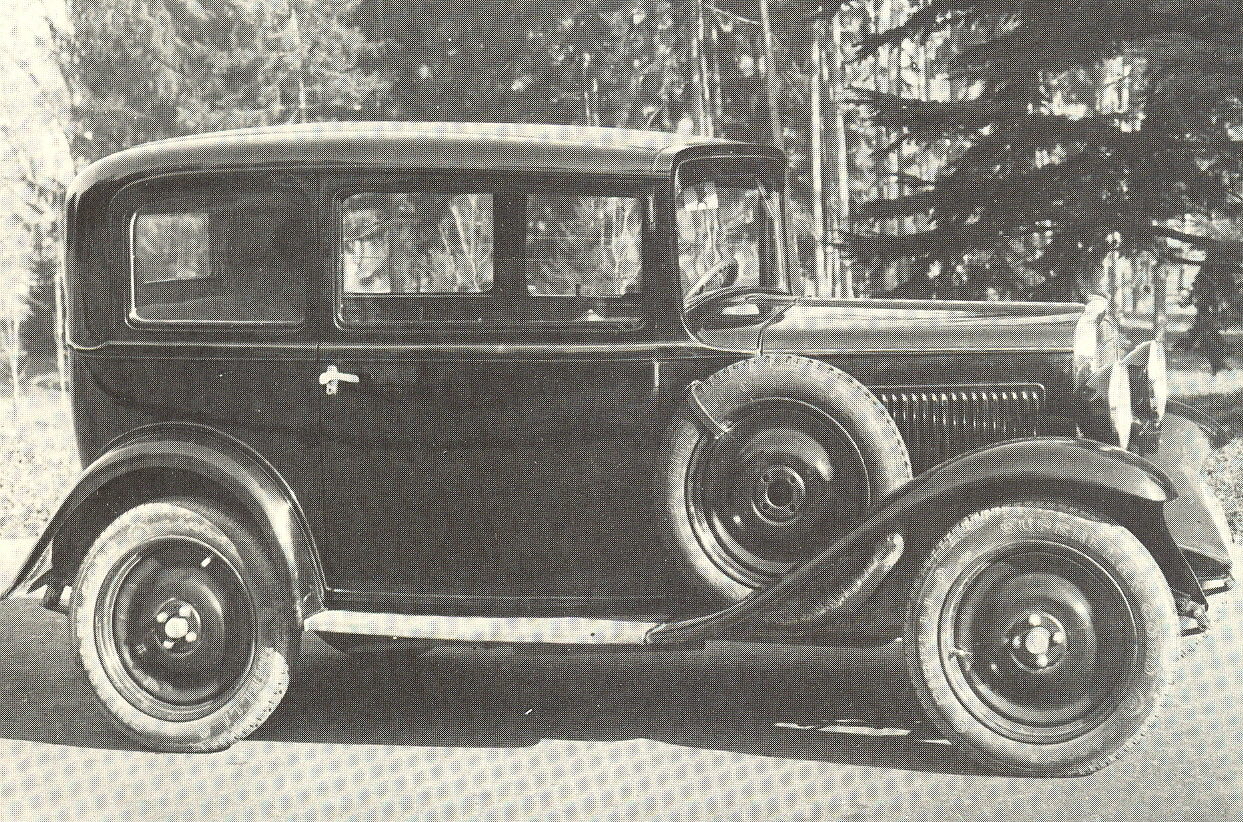 Fiat 508 Ballila (1932)